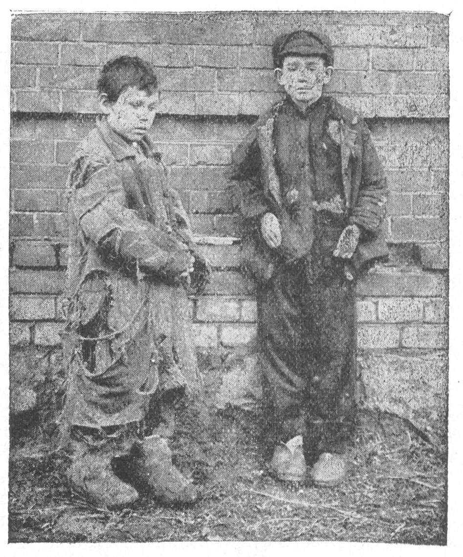 Беспризорники в России, 1920-е годы